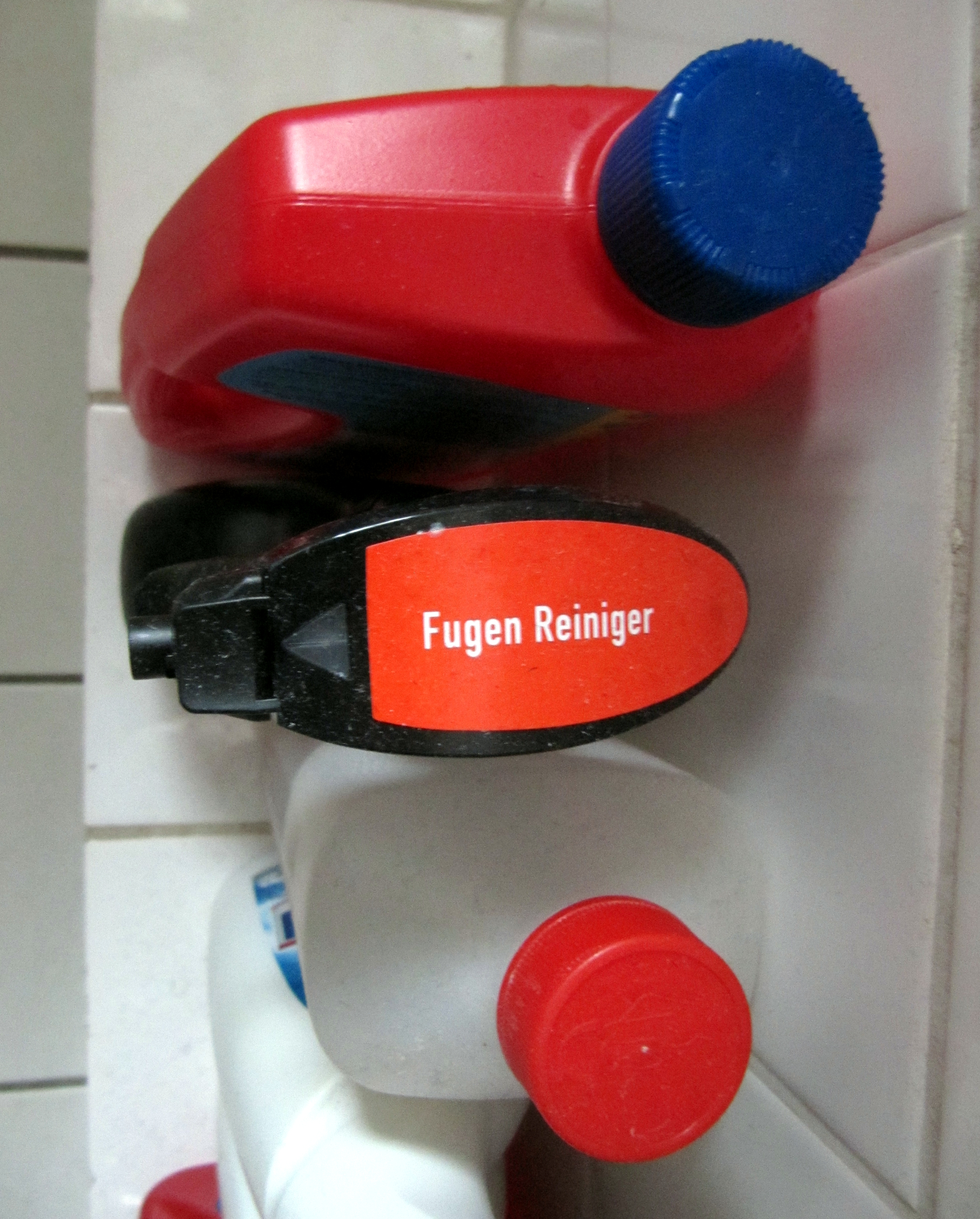 Deppenleerzeichenflasche: "Fugen Reiniger"